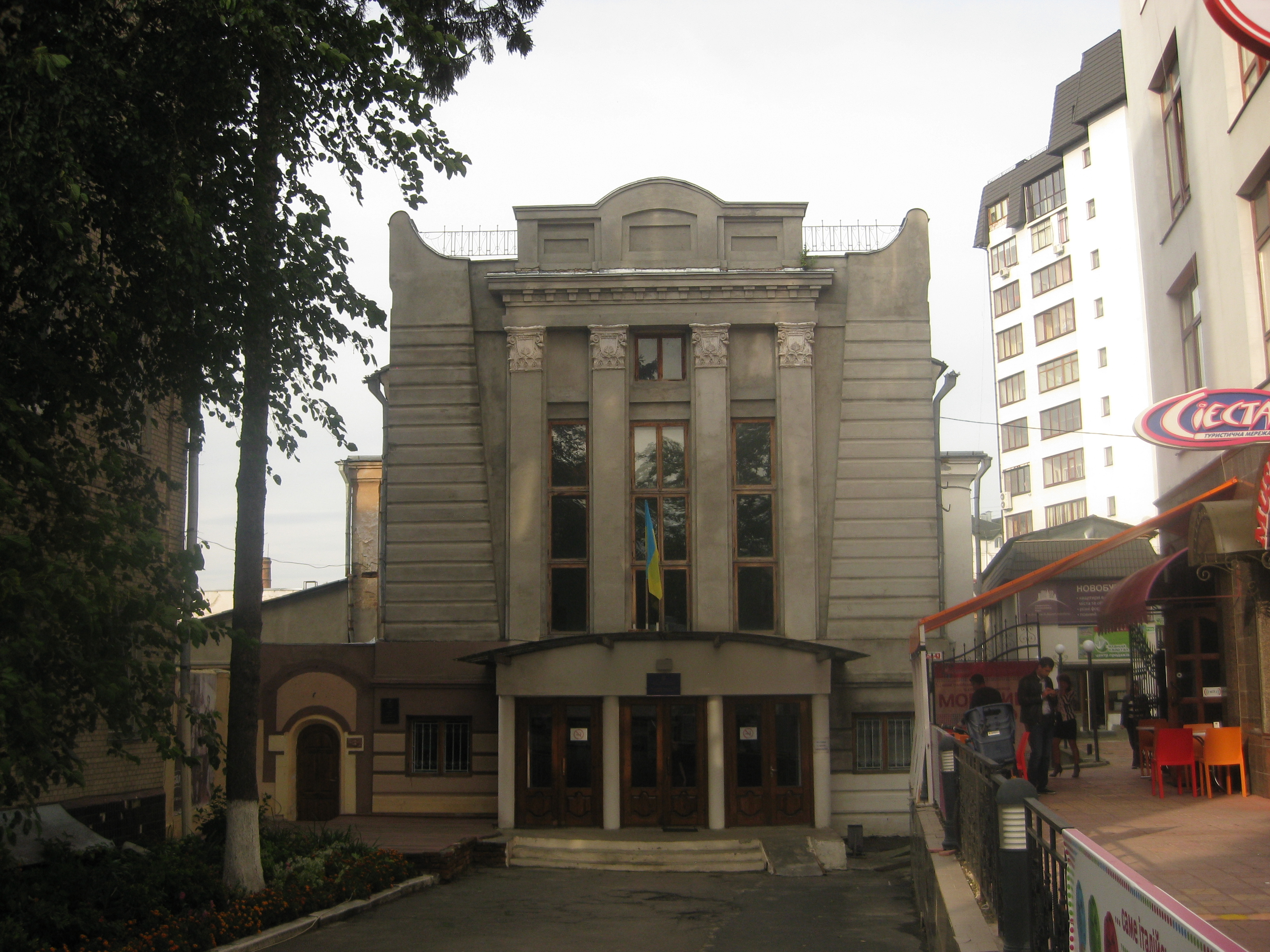 Будинок, Хмельницький, вул. Проскурівська, 43